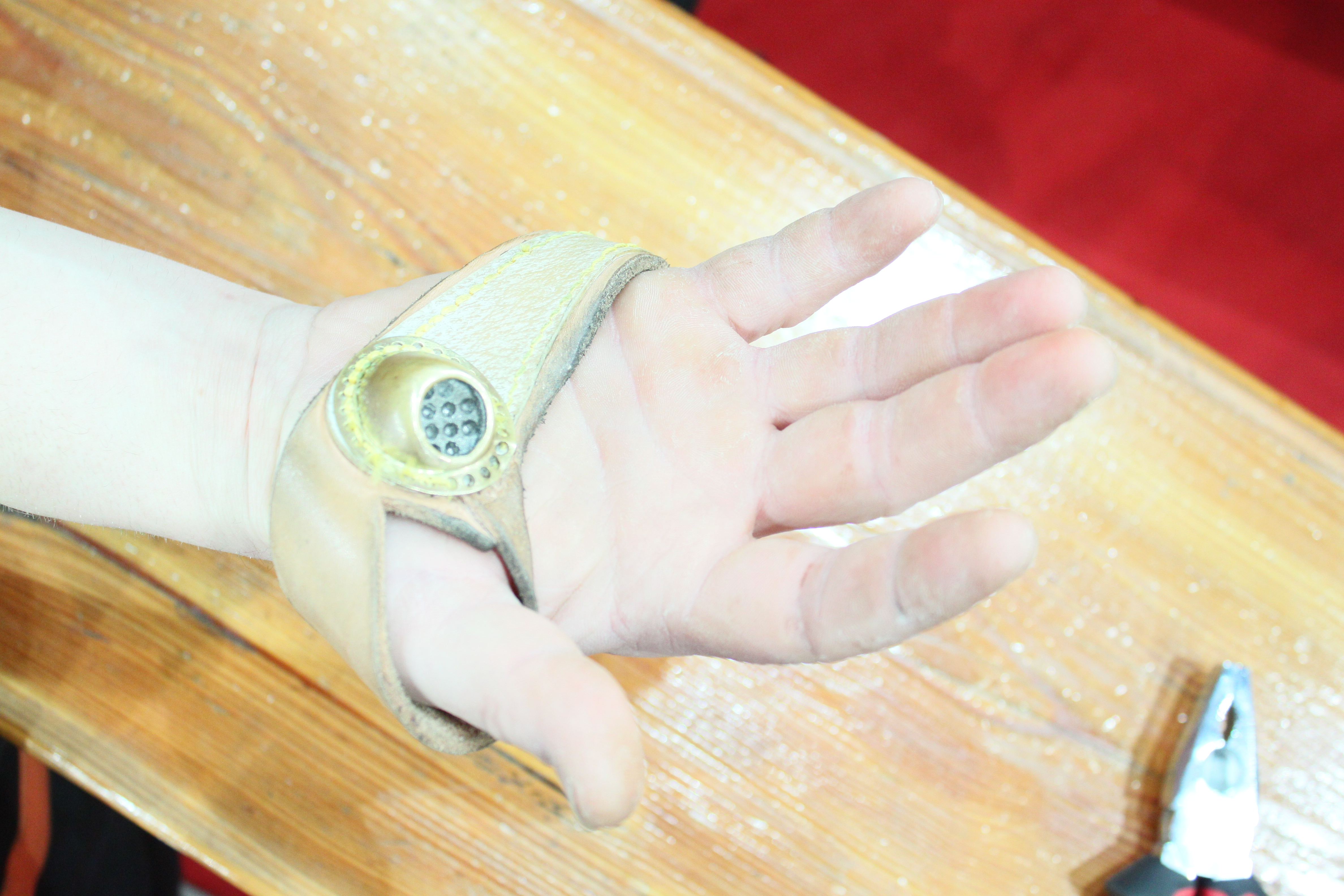 Segelmacherhandschuh , gesehen auf der Messe Bremen "Boot 2011"